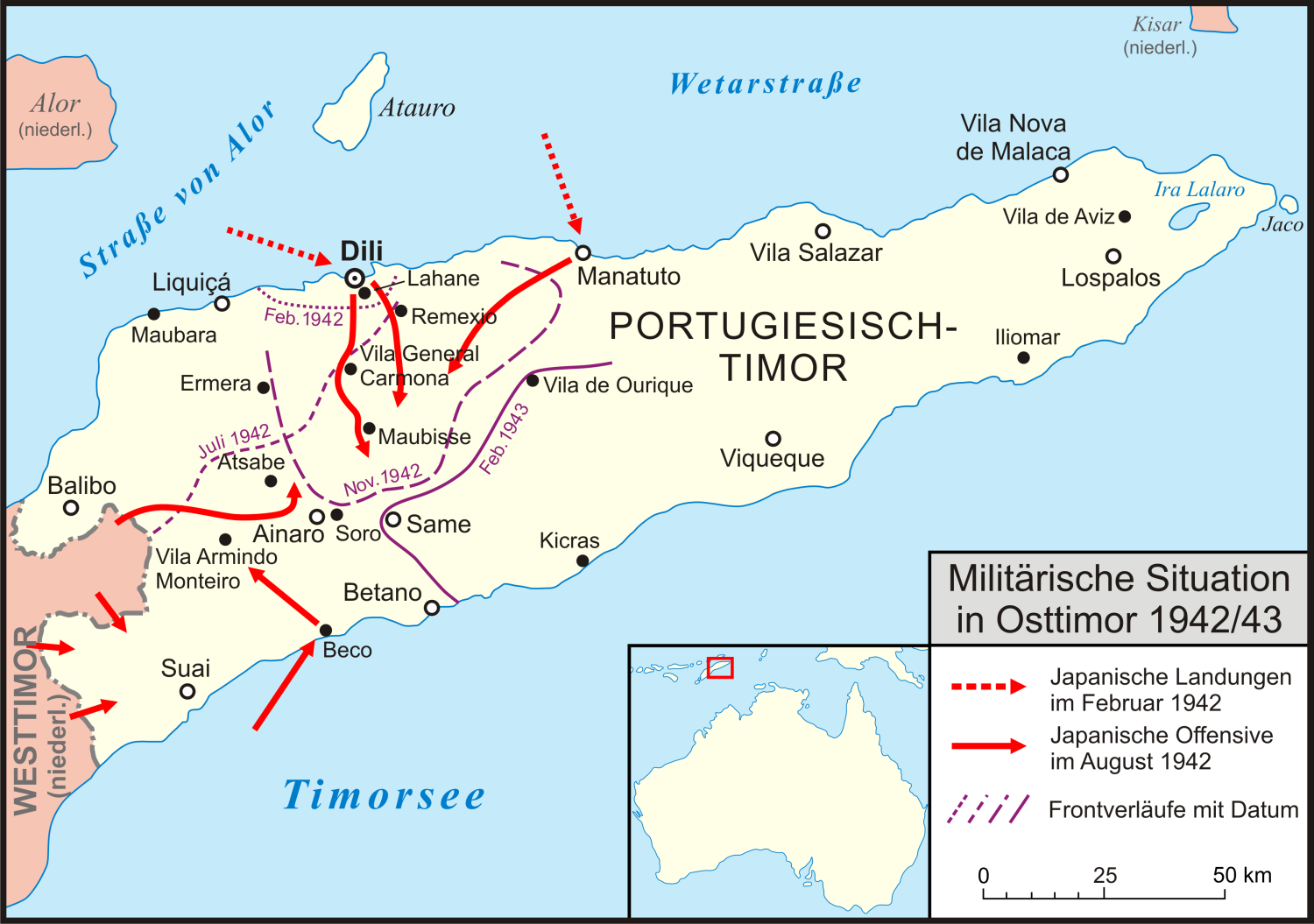 Militärische Situation in Osttimor 1942/43